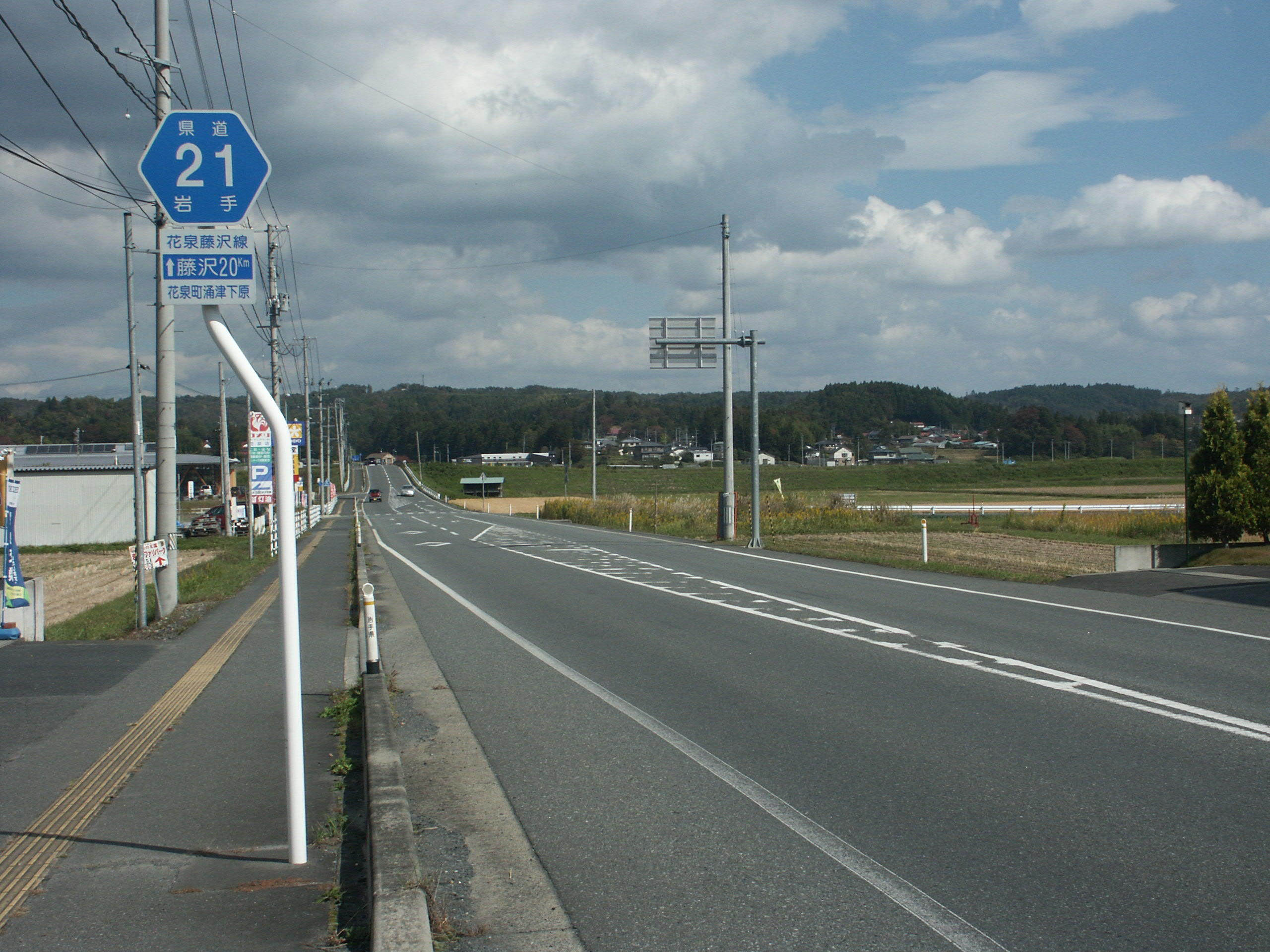 岩手県道21号線一関市涌津下原付近